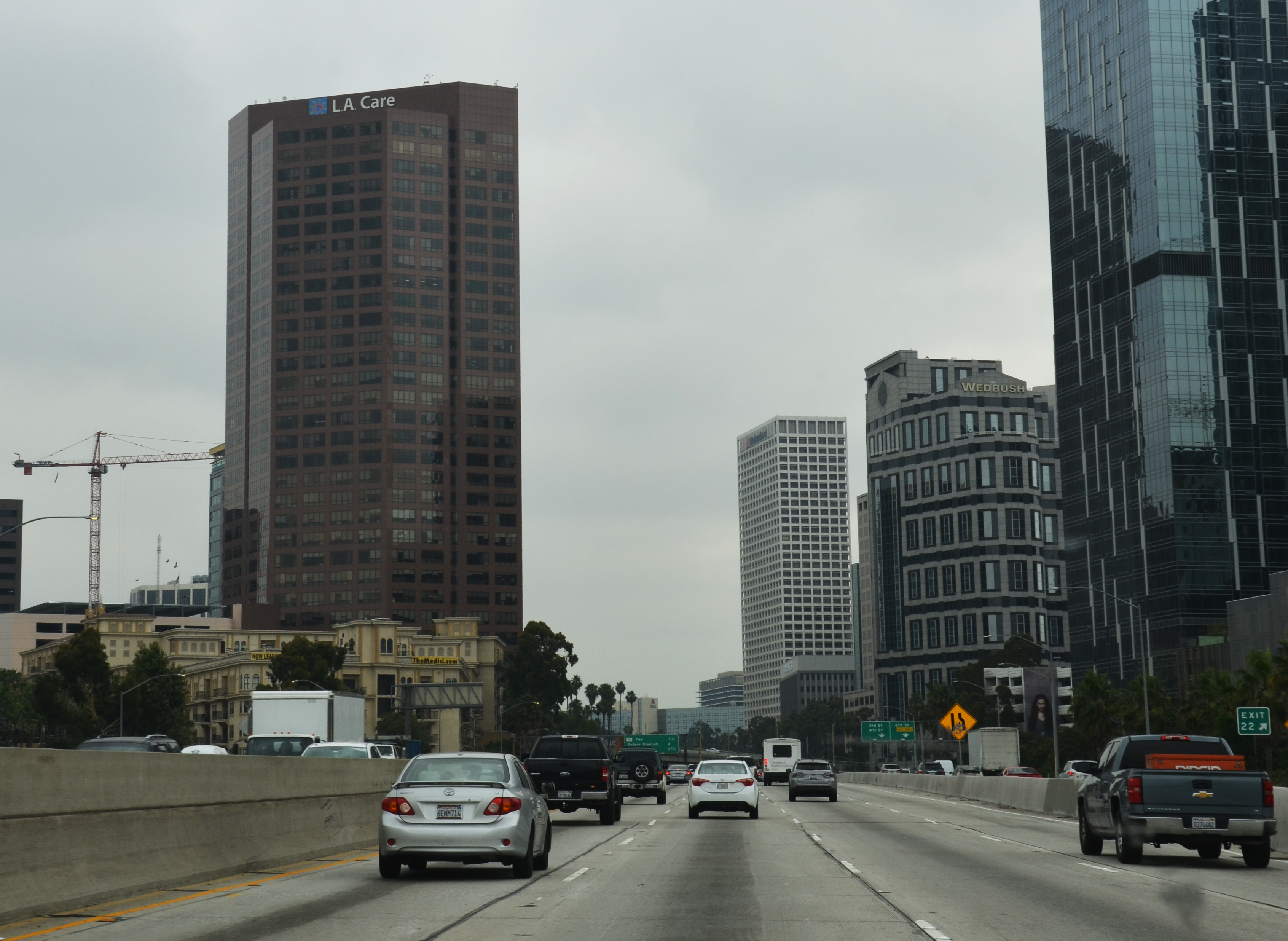 De Interstate 110 in Los Angeles, met links het gebouw van LA Care, rechts het gebouw van Wedbush.